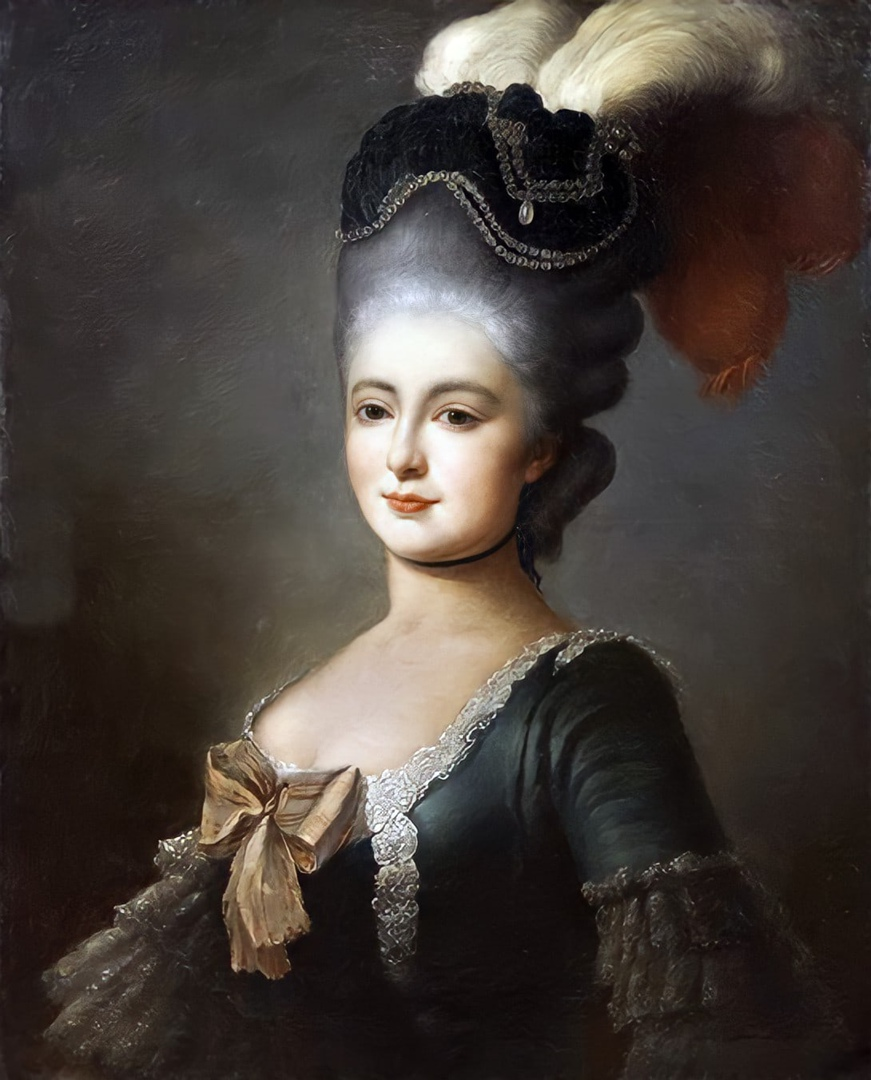 рицы Марии Федоровны» Холст, масло, XIX в., 79,5х62 см. Императрица Мария Федоровна - супруга Императора Павла I. Иконография восходит к портрету Великой княгини, написанному в 1777 году Александром Рослином (Roslin).